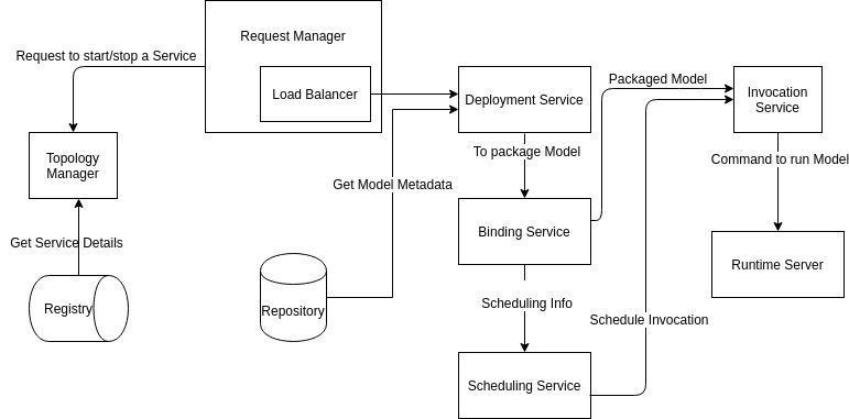 परिनियोजन सेवा आर्किटेक्चर